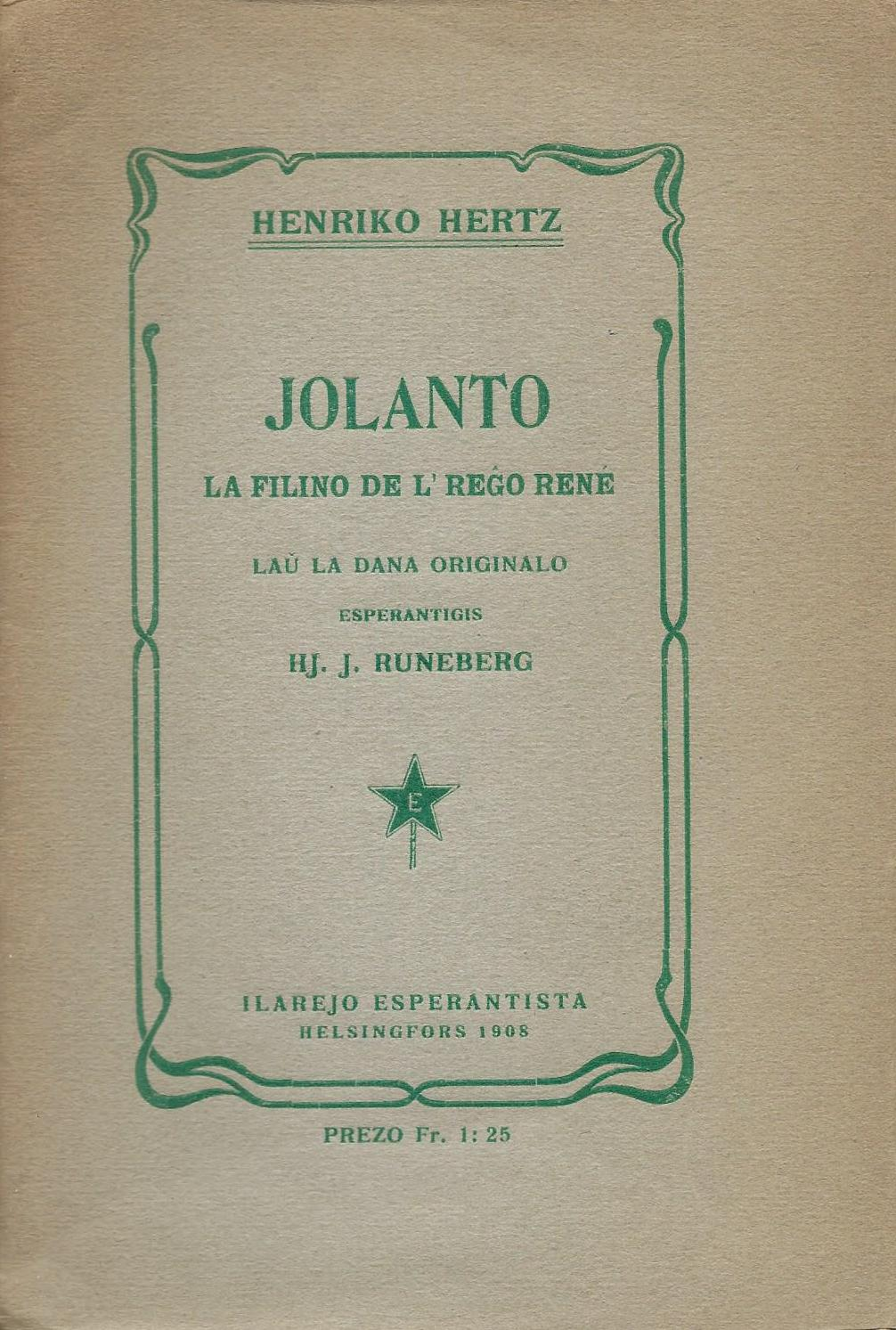 librokovrilo de libro "Jolanto", 1908